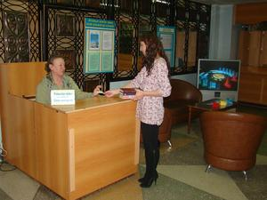 Отдел информации, регистрации и учета Костанайской ОУНБ им.Л.Н. Толстого